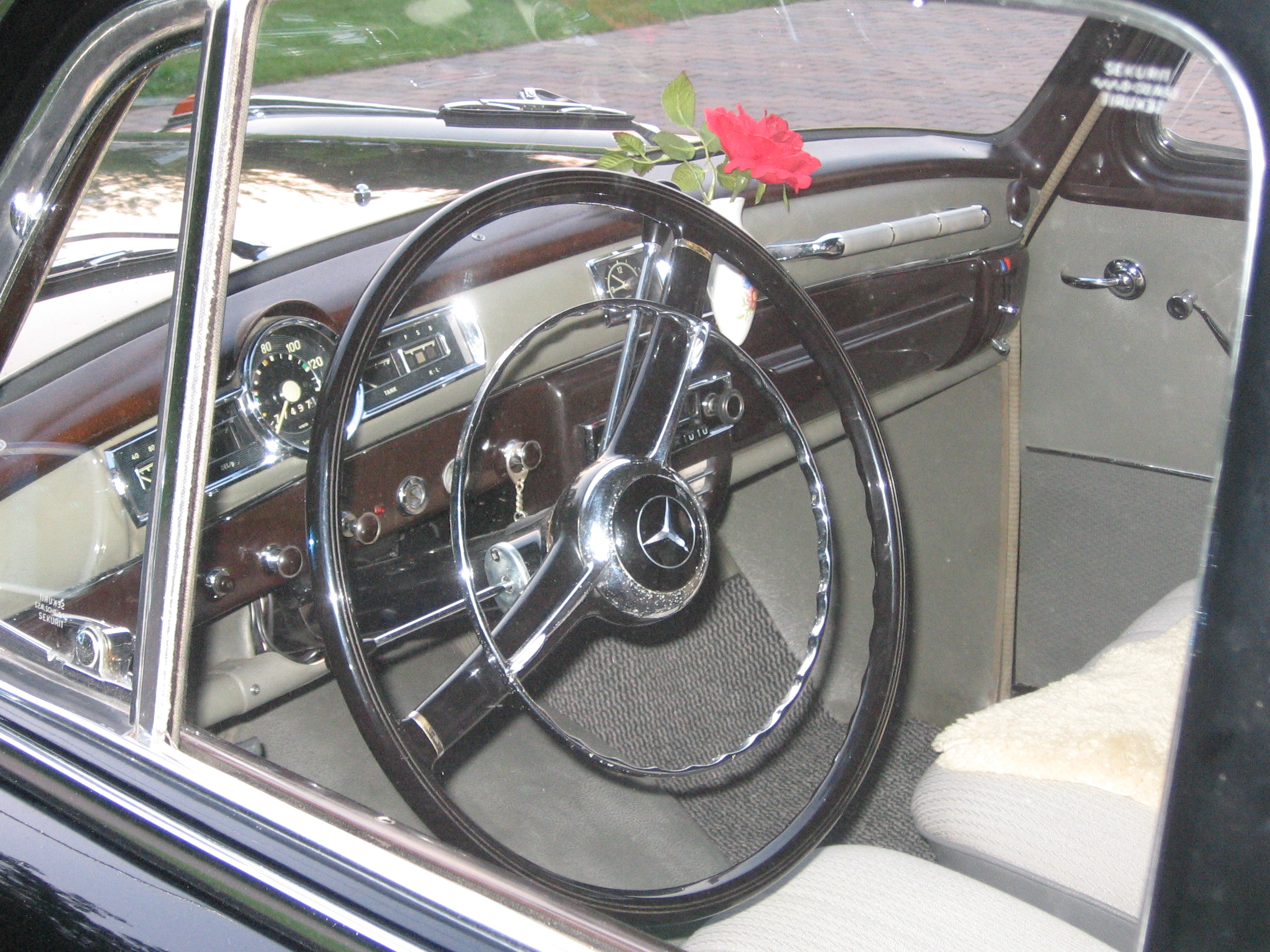 Mercedes 219, 1957